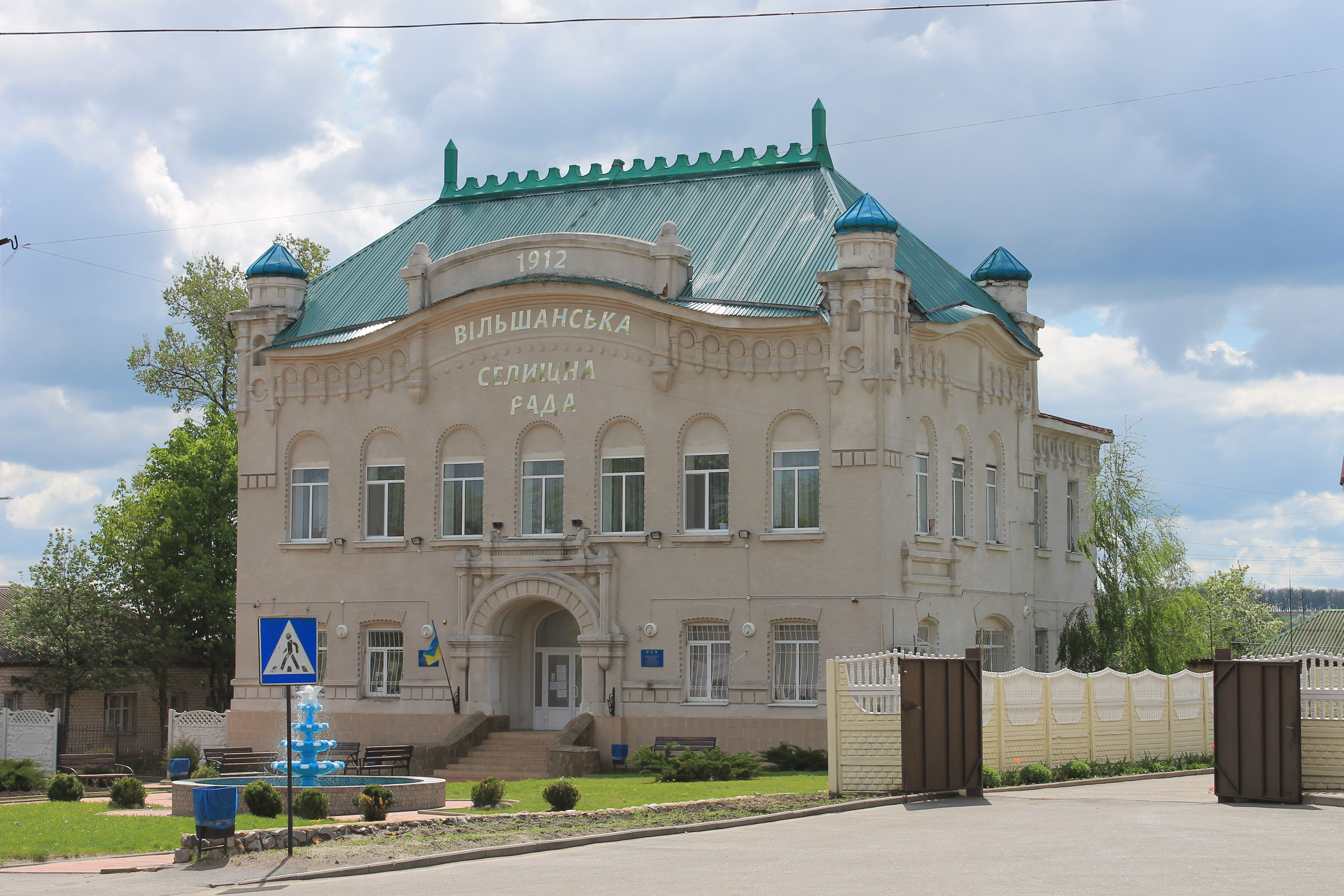 Колишній Земельний банк 1907р., вул.Радянська,2, смт Вільшани, Дергачівський р-н., Харківська обл.